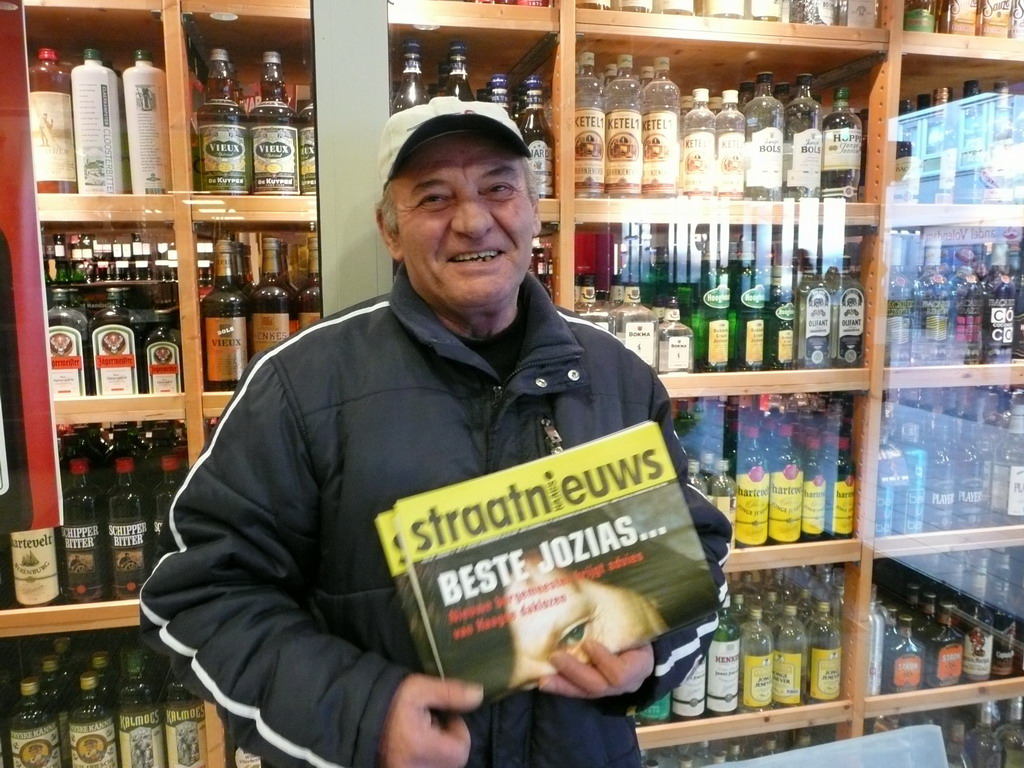 A man selling Straatnieuws (a street newspaper) outside an Albert Heijn supermarket in Zoetermeer, the Netherlands.